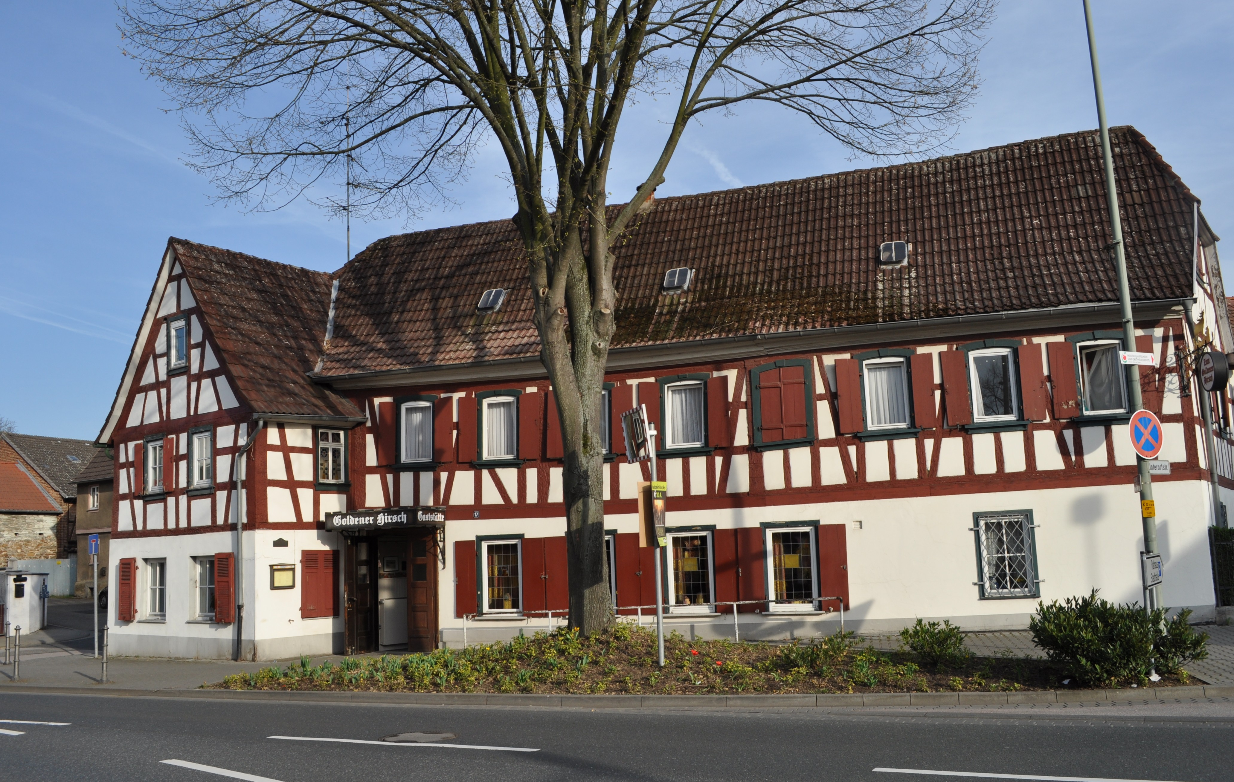 Eschborn, Hauptstraße 17, Goldener Hirsch